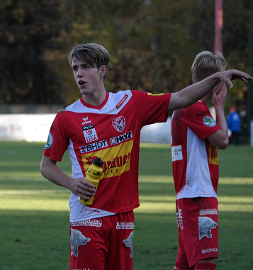 Johannes Felsner